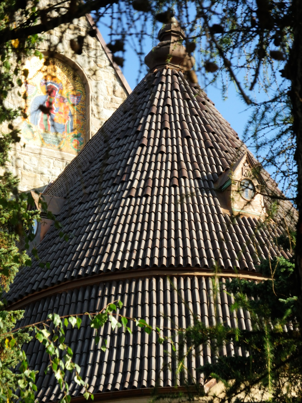 Dach Bazyliki Matki Boskiej Bolesnej w Limanowej po remoncie. Na dachu dachówka coppino tirolo Industrie Cotto Possagno